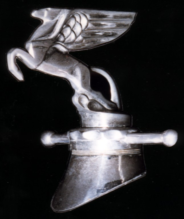 Quelle: Harald H. Linz